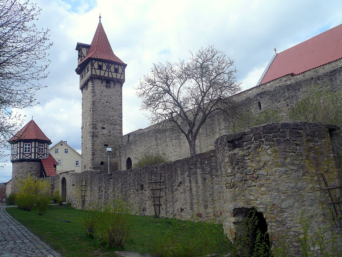 Kirchenburg Ostheim, Südseite